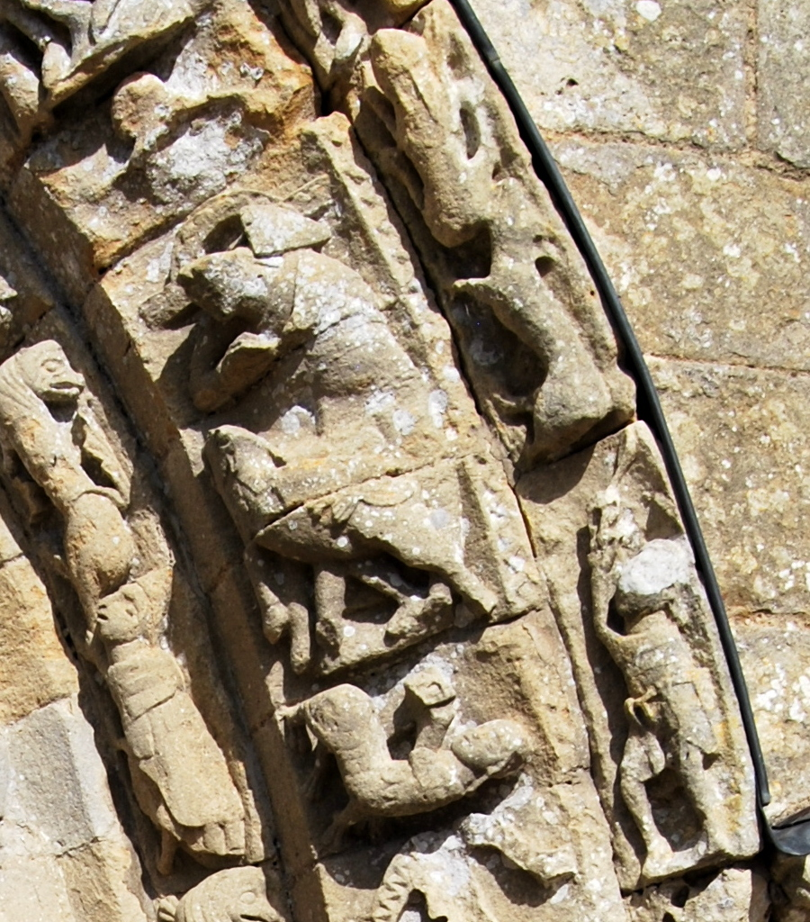 Détails du Zodiaque du Portail